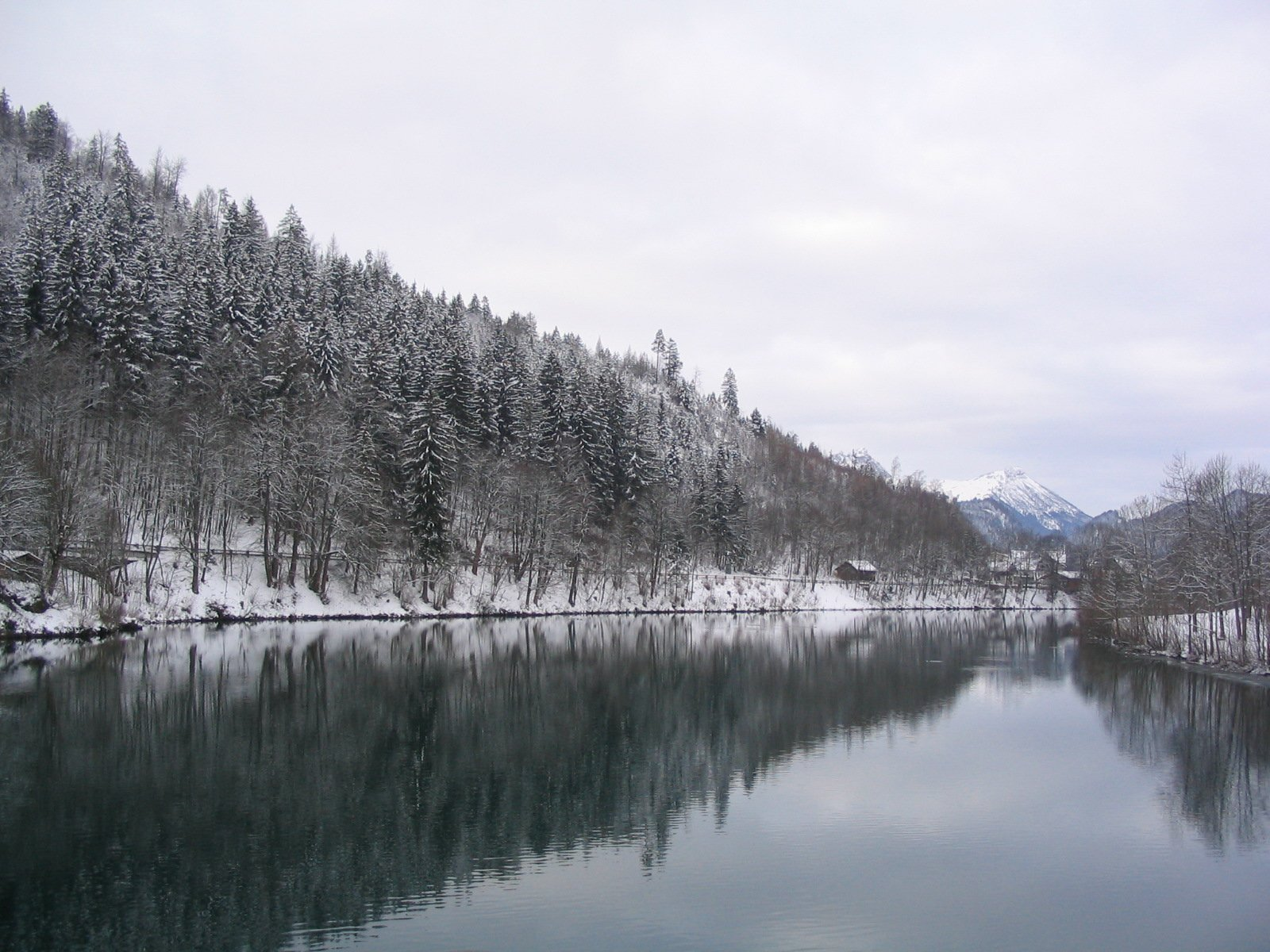 Der Lech bei Füssen